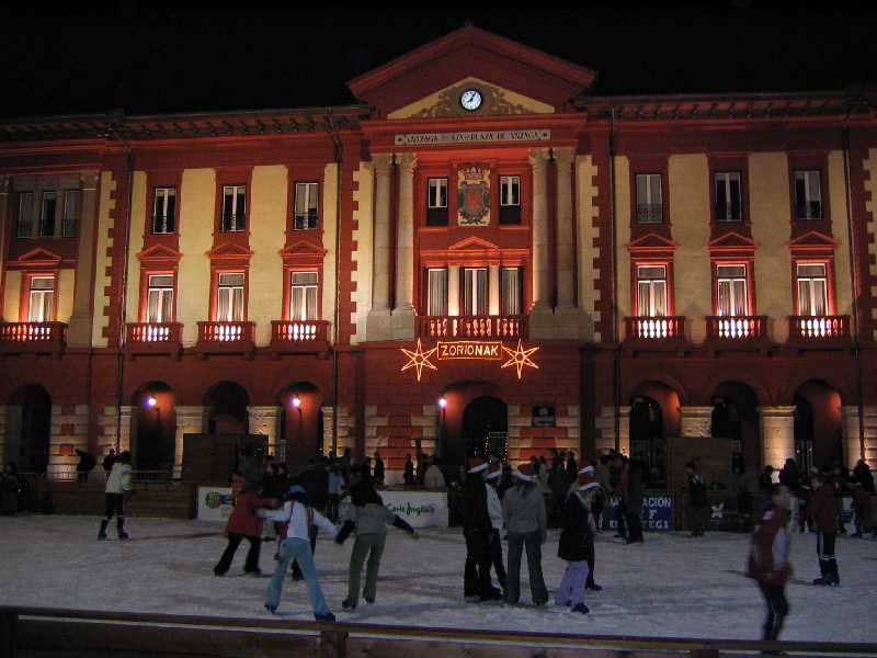 Vista de la plaza de Untzaga y del ayuntamiento de Eibar. Diciembre 2005.